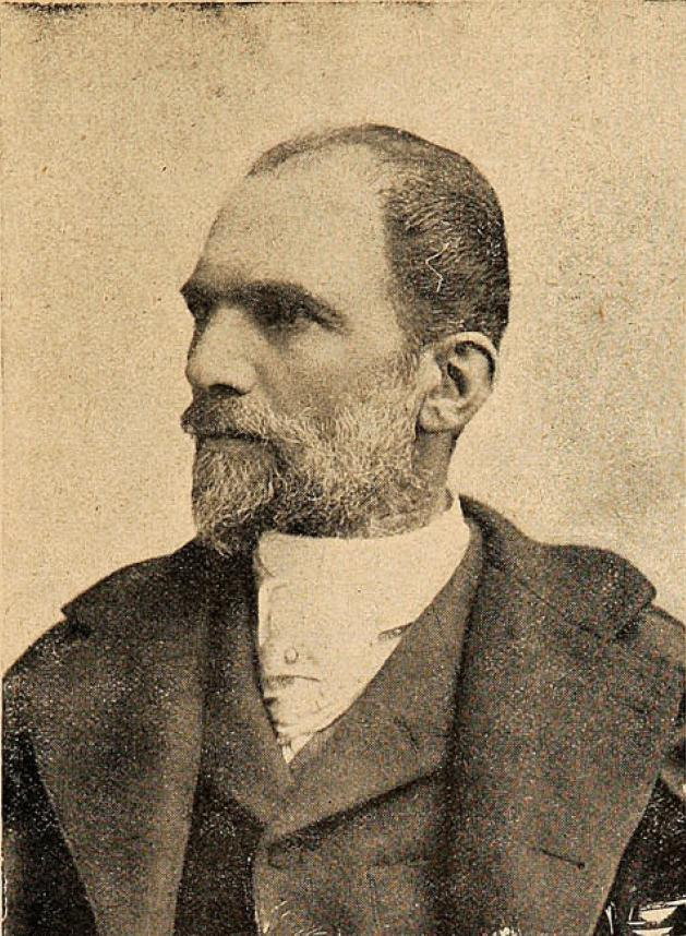 Augusto Antonio Orrego Luco (Valparaíso, Chile, 2 de mayo de 1849 - ibídem, 26 de agosto de 1933) fue un psiquiatra chileno que perteneció a la generación ilustrada de tendencia liberal, progresista y laica, y que participó activamente en los gobiernos de la época liberal y en la Guerra Civil de 1891, también llamada Revolución de 1891. Llegó a ser designado como ministro dos gobiernos y electo como diputado.